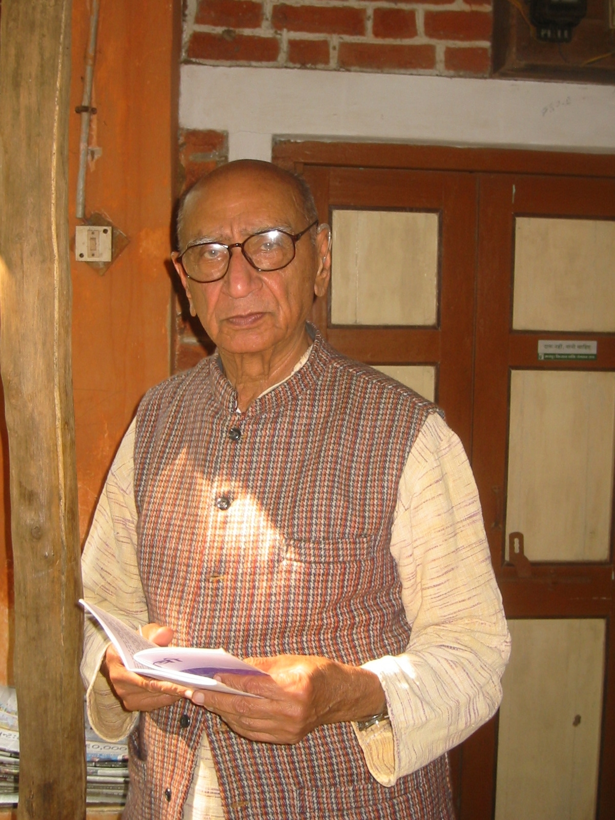 Narayan Desai, Vedchhi, Gujarat.